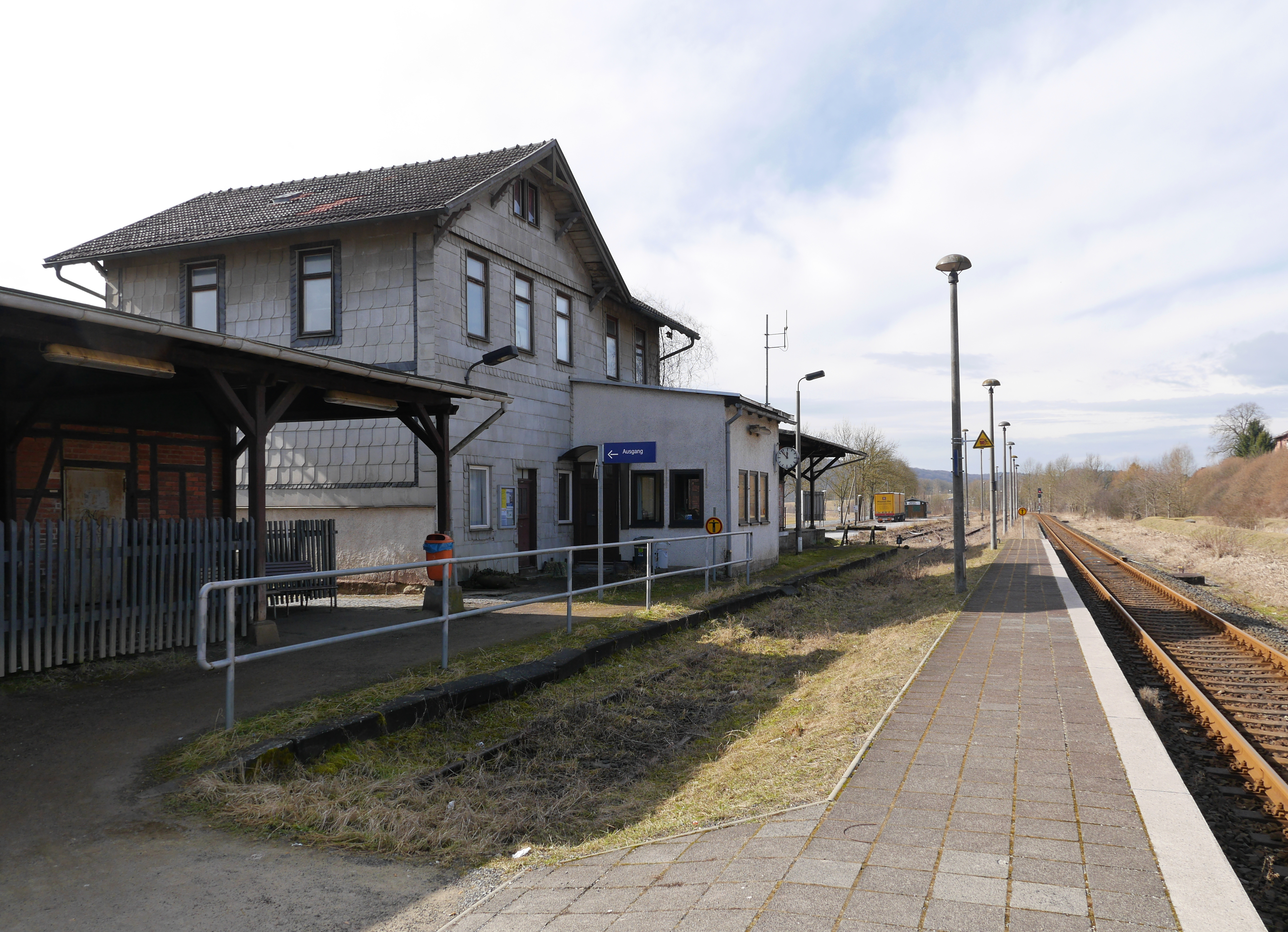 Empfangsgebäude und Bahnsteige des Bahnhofs Veilsdorf